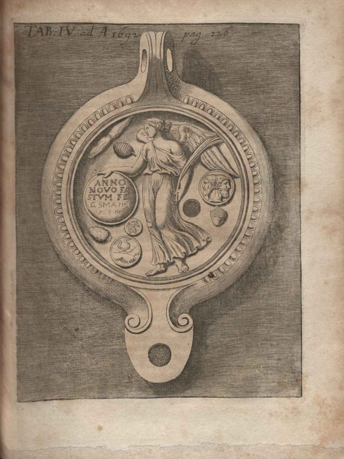 Illustration